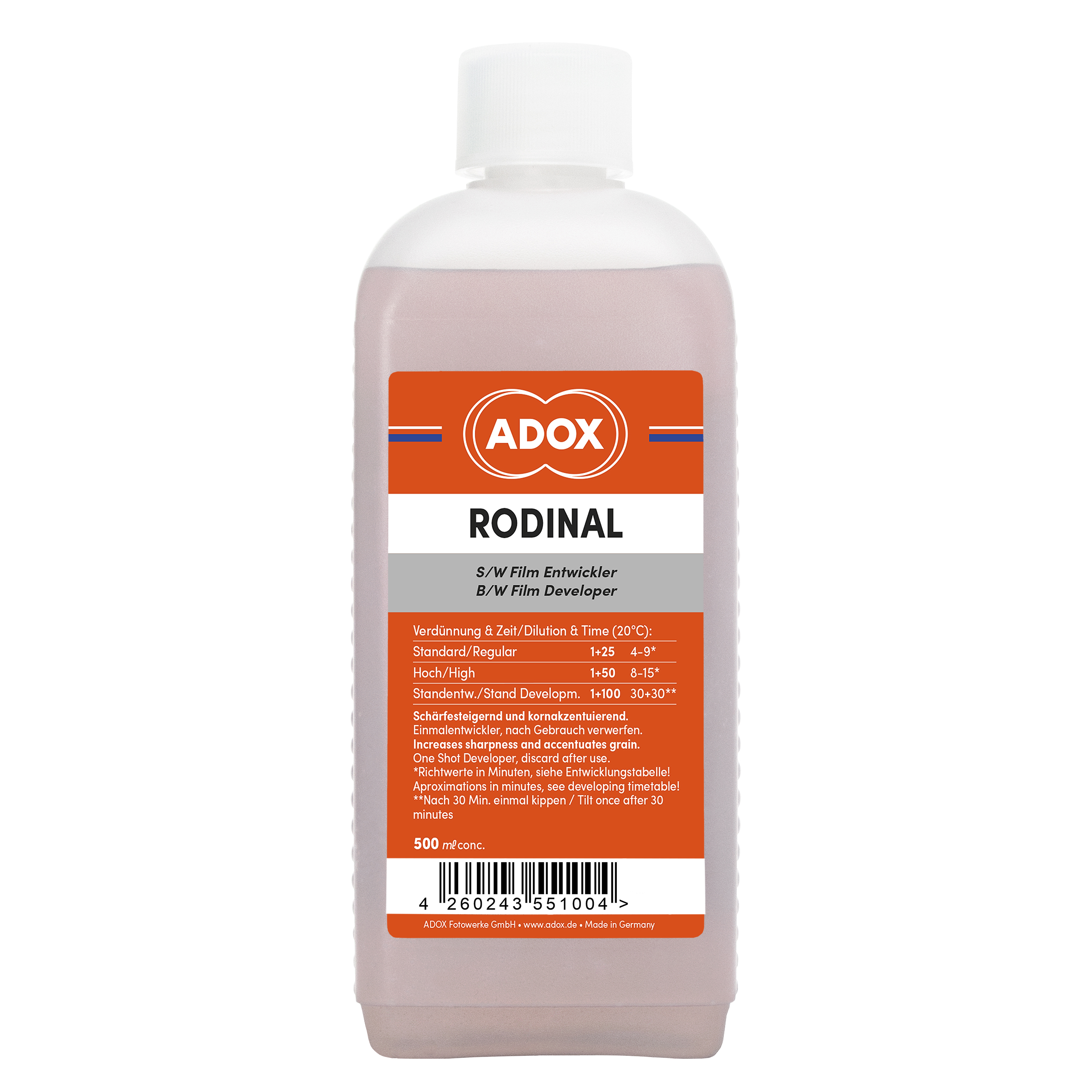 Rodinal in seiner aktuellen Version